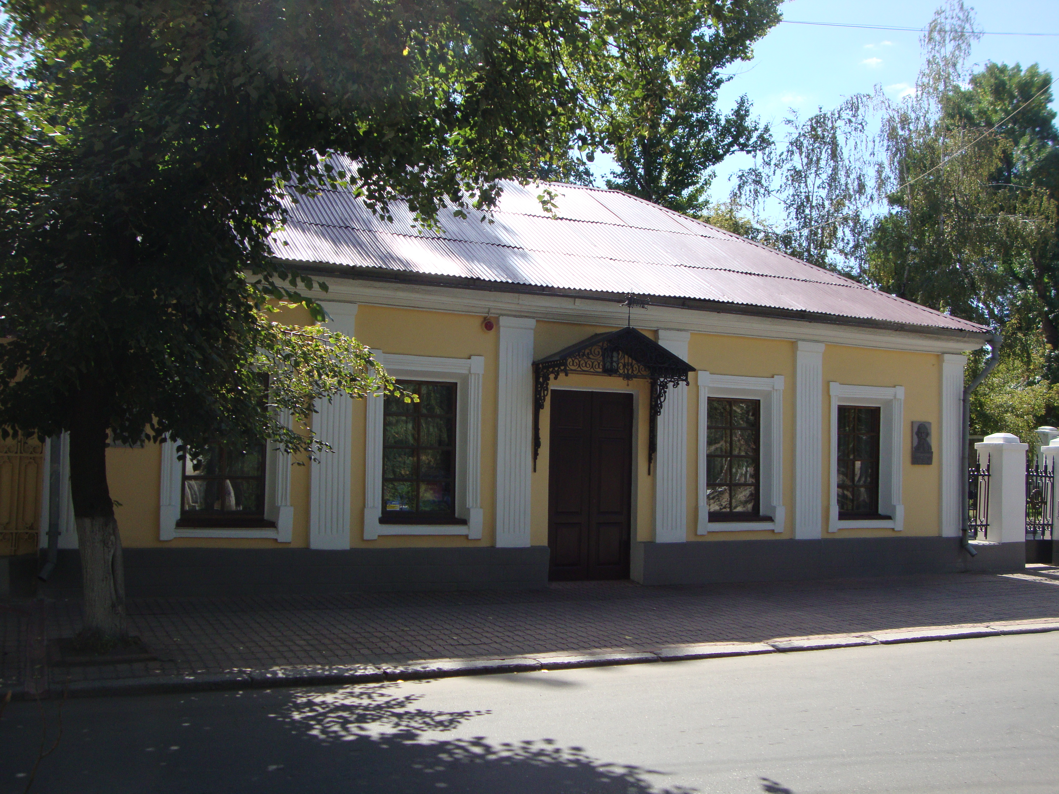 Будинок, у якому народився Володимир Даль